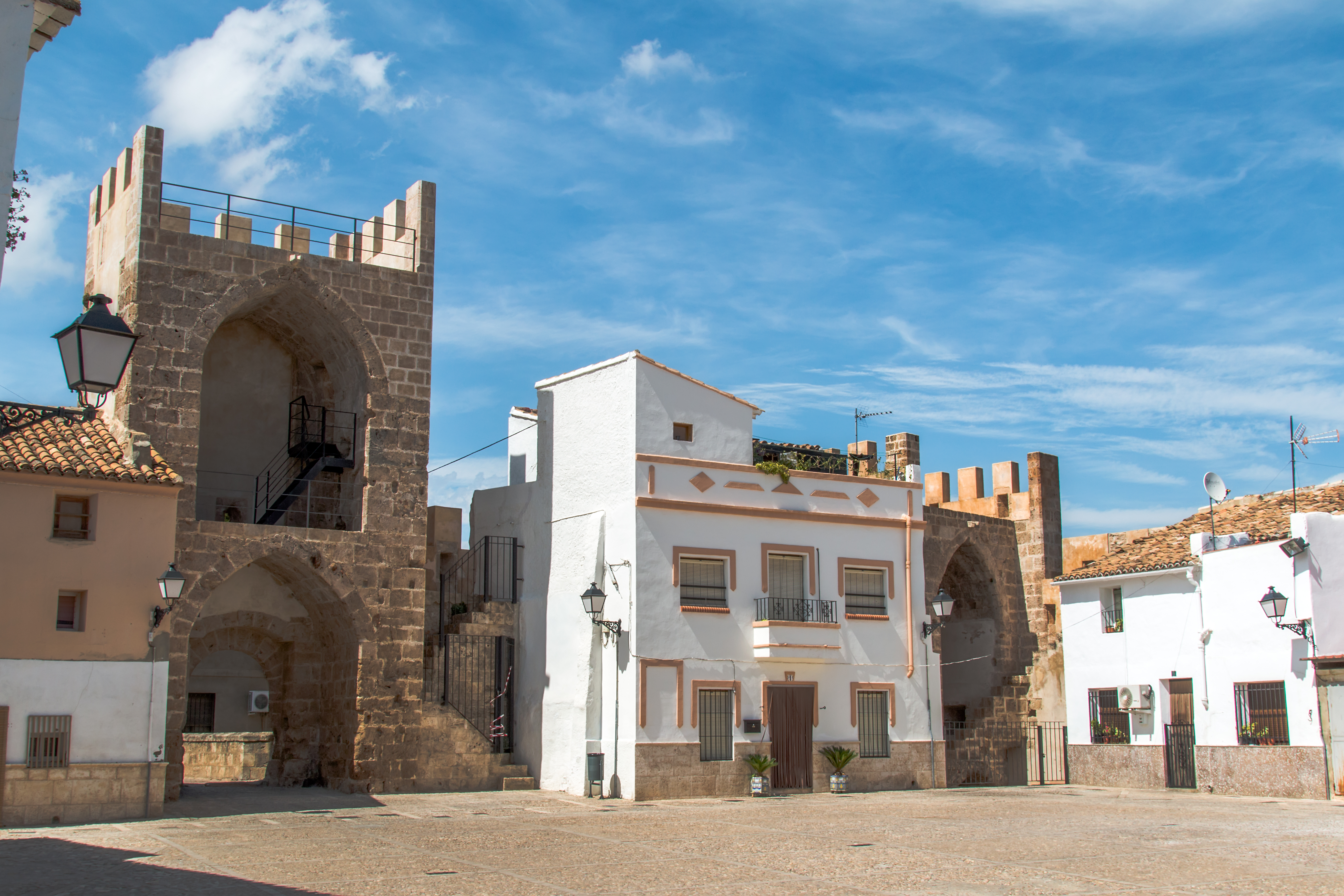 Замок Буньоль. Сверная площадь. Вид на север.